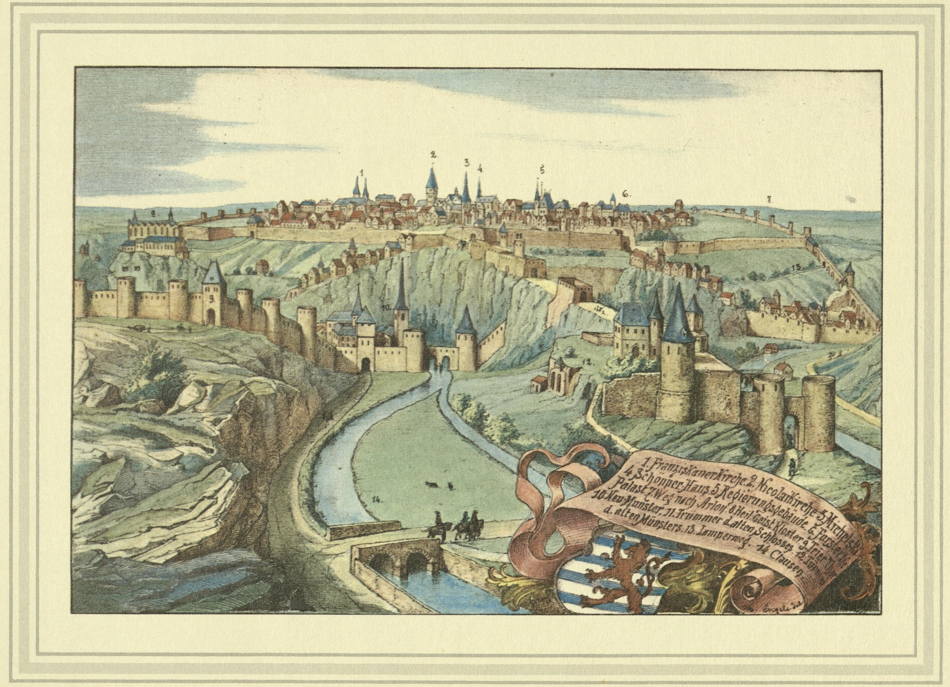 Dessin pittoresque de la forteresse de la Confédération germanique (Bundesfestung) Luxembourg par Michel Engels (1851-1901): II - Luxembourg au XVIe siècle